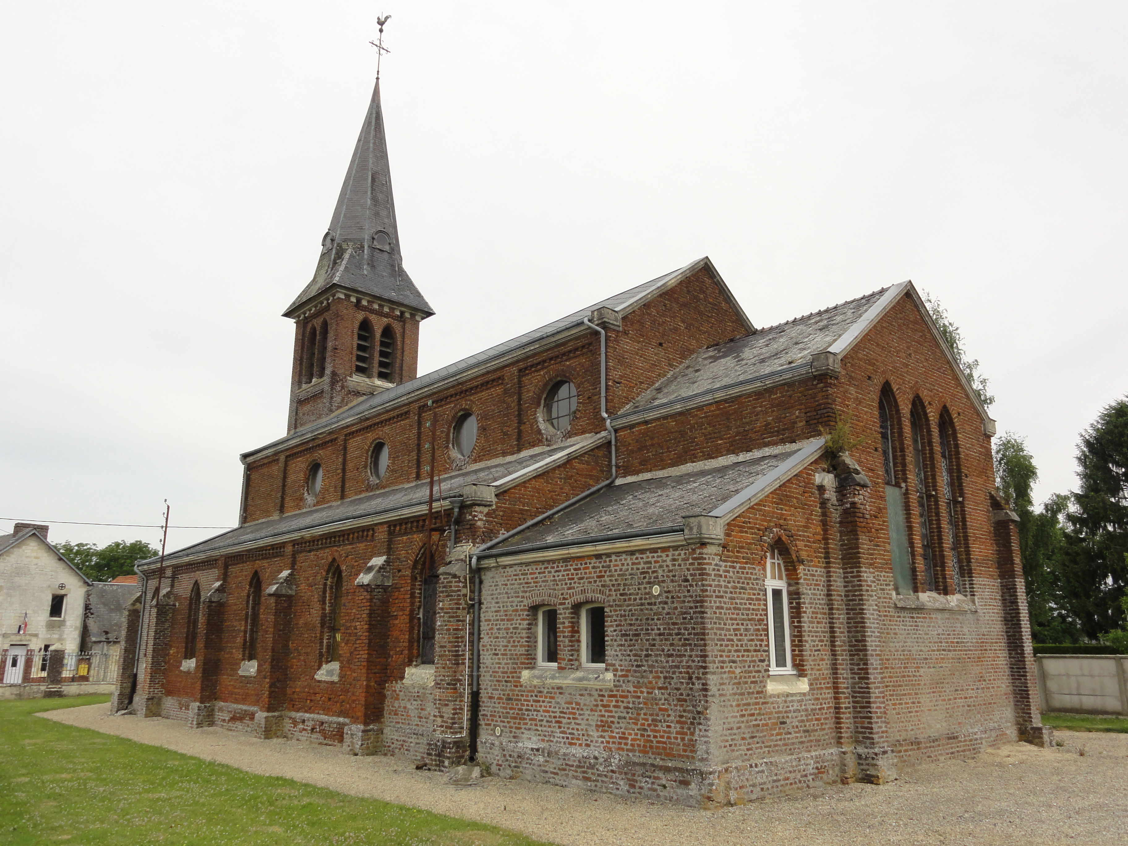 Le Thuel (Aisne) église